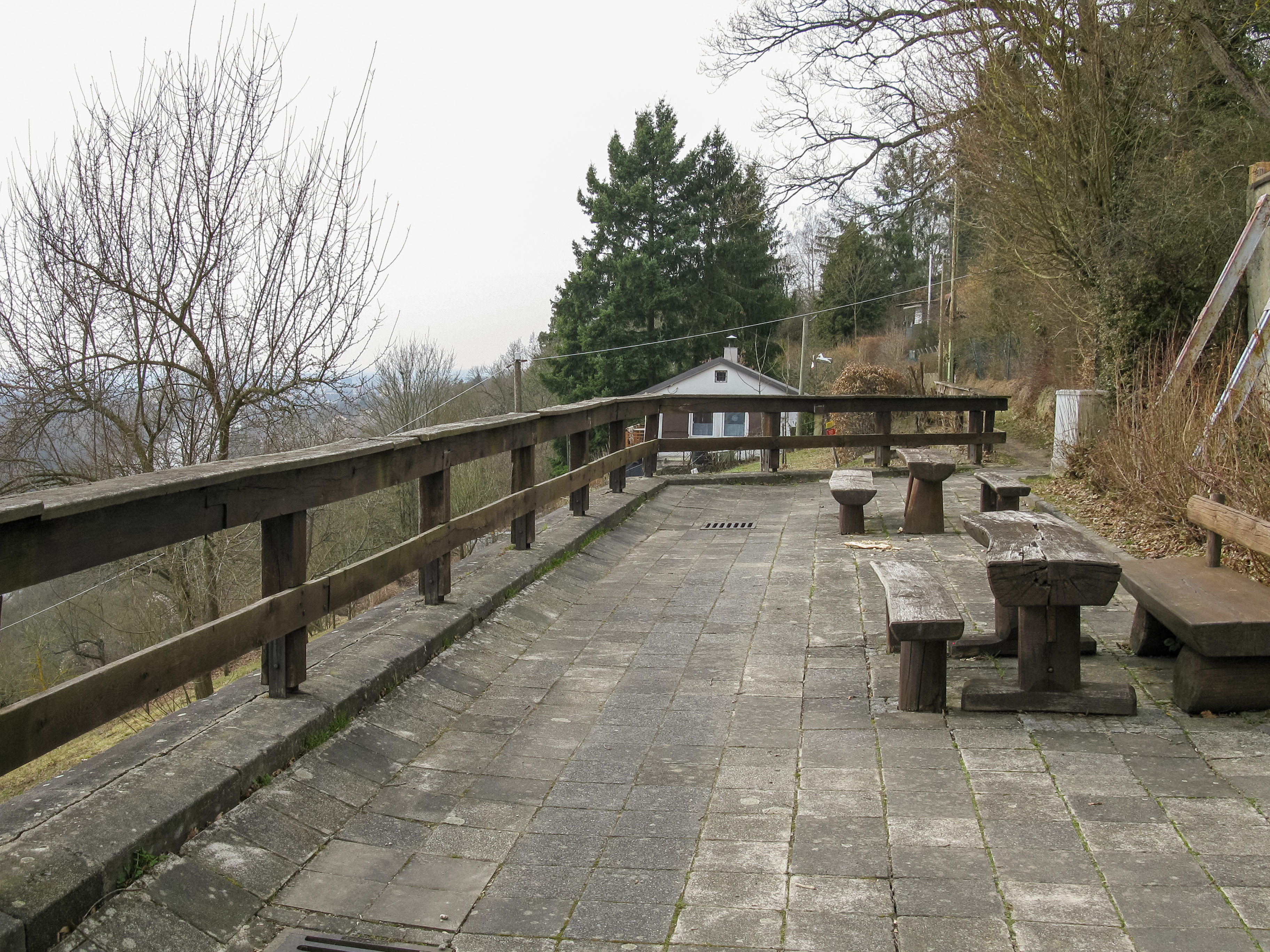 (LSG:BY-LSG-00075.01)_Landschaftsschutz der Mainleite im Bereich der Stadt Schweinfurt und des Landkreis Schweinfurt - Aussichtsplattform an der Mainleite